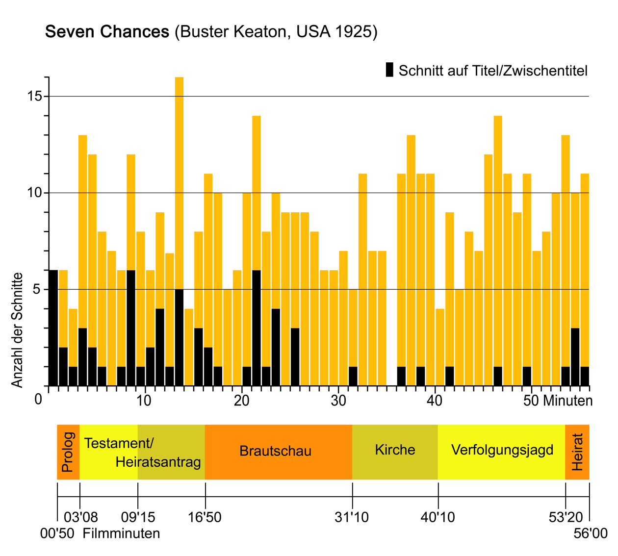 Schnittfrequenzgrafik und Zeitleiste zu Buster Keatons Film "Seven Chances" (1925).